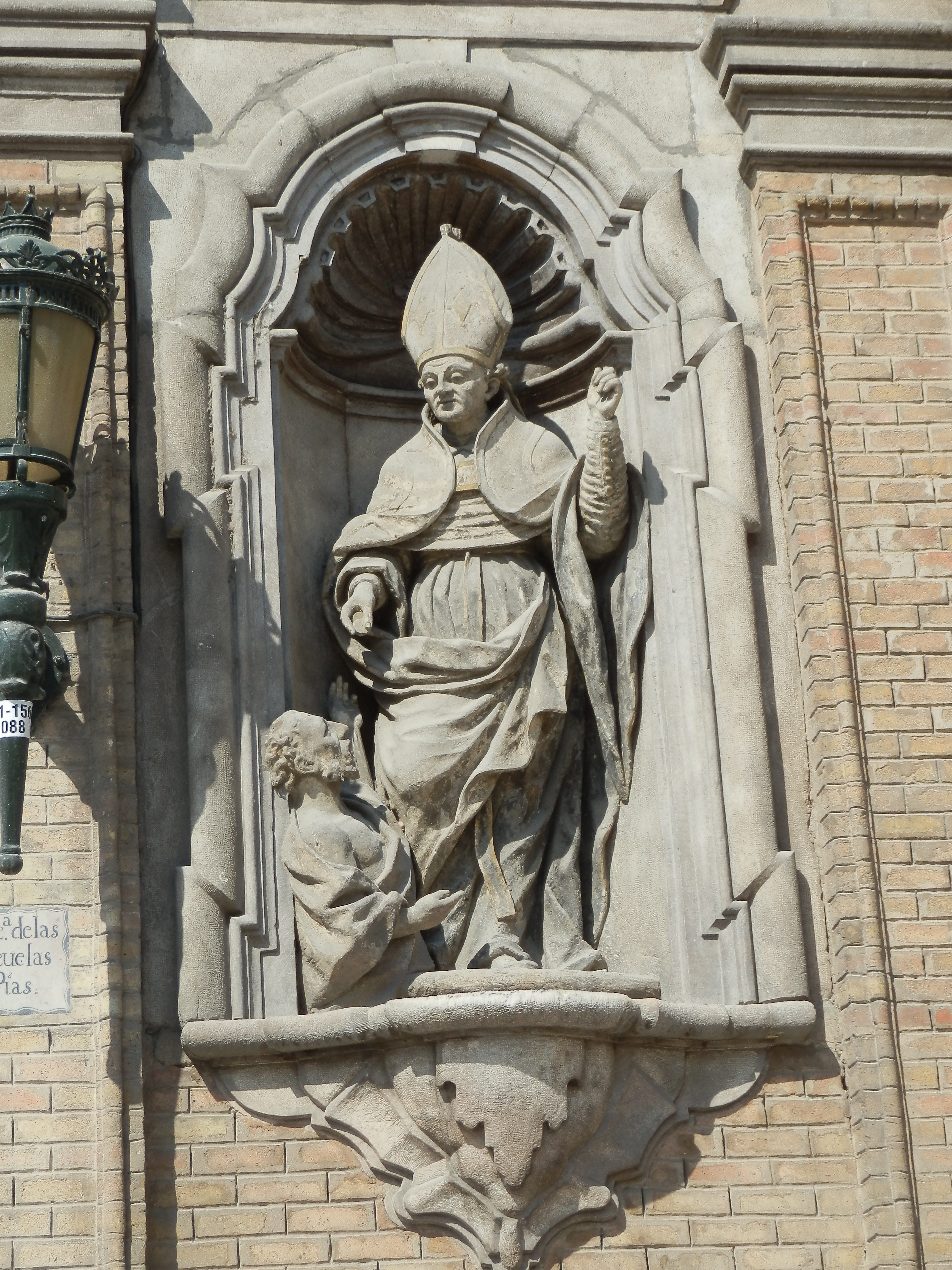 Iglesia de los Escolapios o de Santo Tomás. Situada en la avenida César Augusto, 37, de Zaragoza, España. Es bien de interés cultural (BIC) de la provincia de Zaragoza.